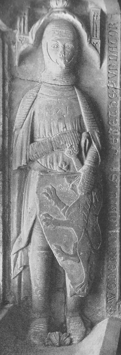 Grabmal des Wedekind von Rheda